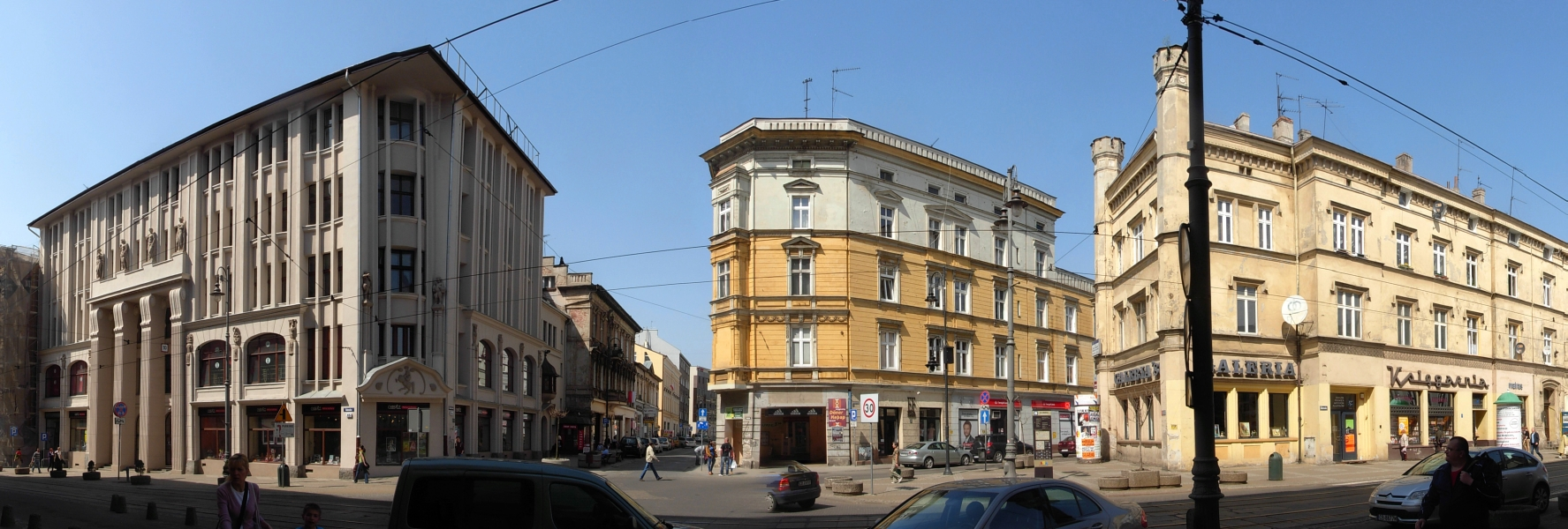 Styk ulic: Gdańskiej, Dworcowej i Pomorskiej na terenie Śródmieścia w Bydgoszczy